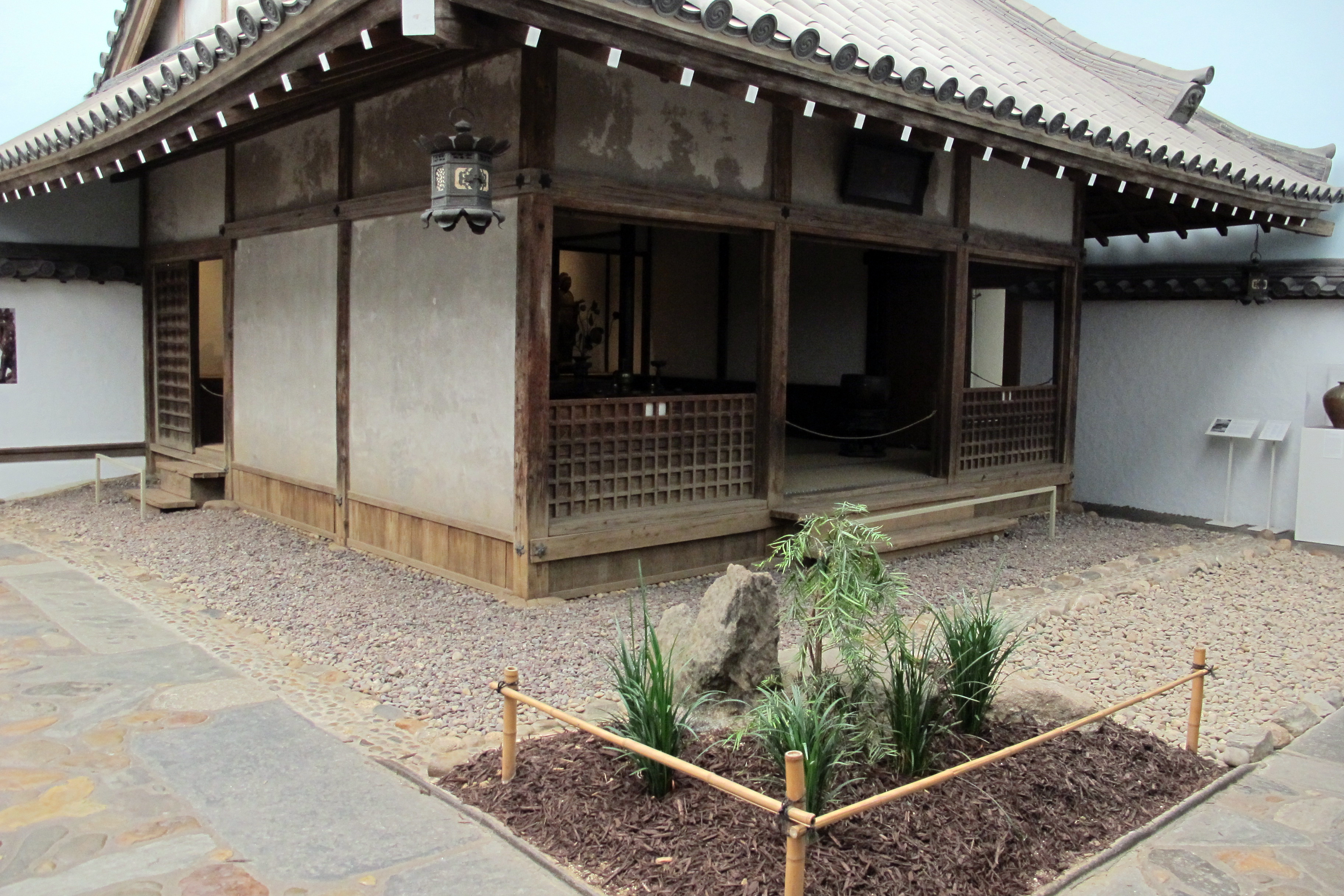 Philadelphia Museum of Art